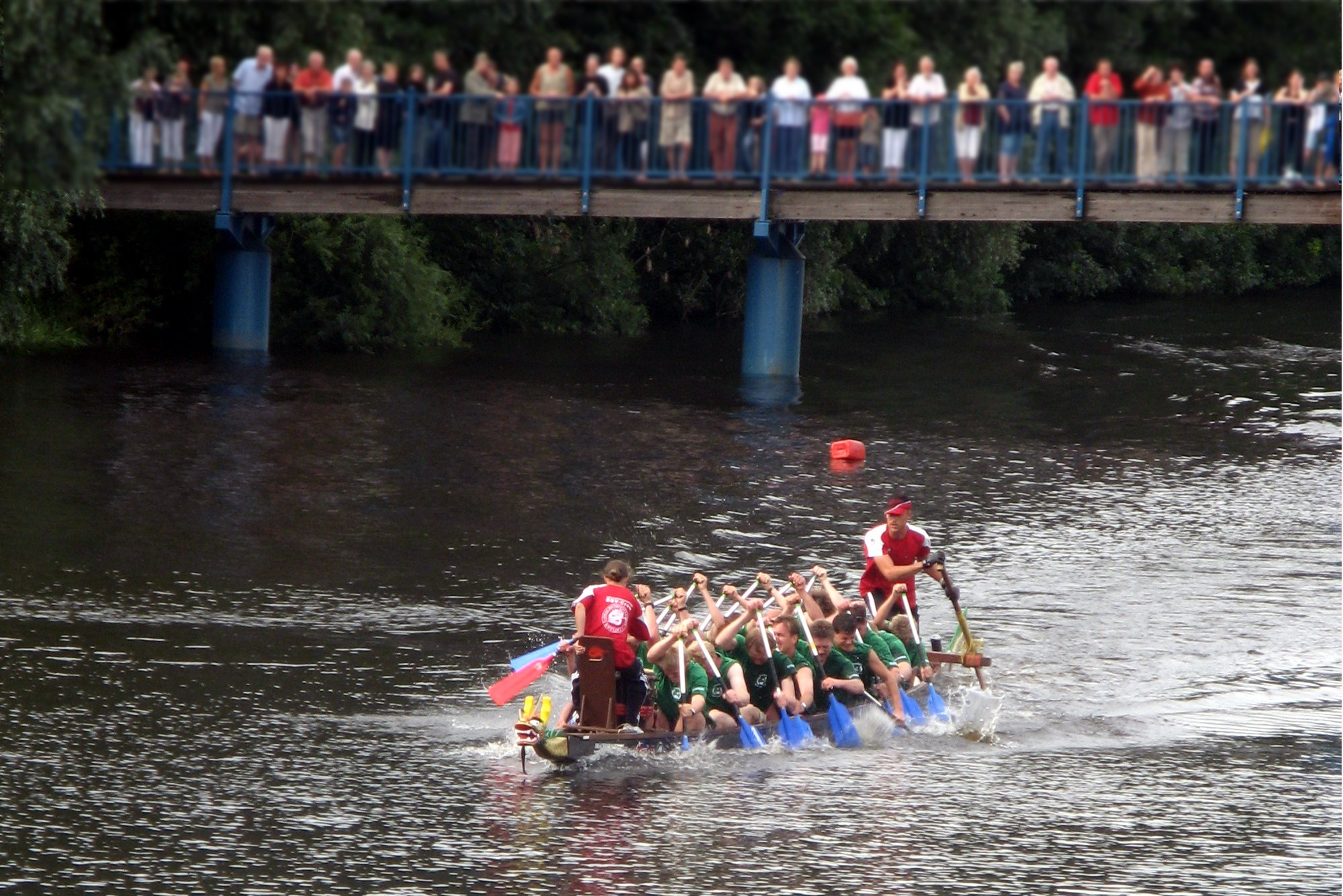 drago n boat racing in Friedrichstadt, Schleswig-Holstein